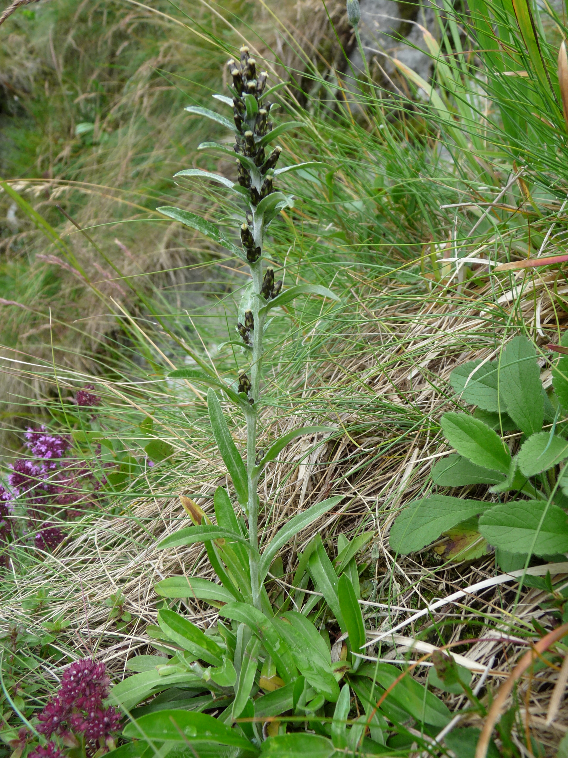 Gnaphale de Norvège (Gnaphalium norvegicum) dans les Spitzkoepfe, Vosges (France)